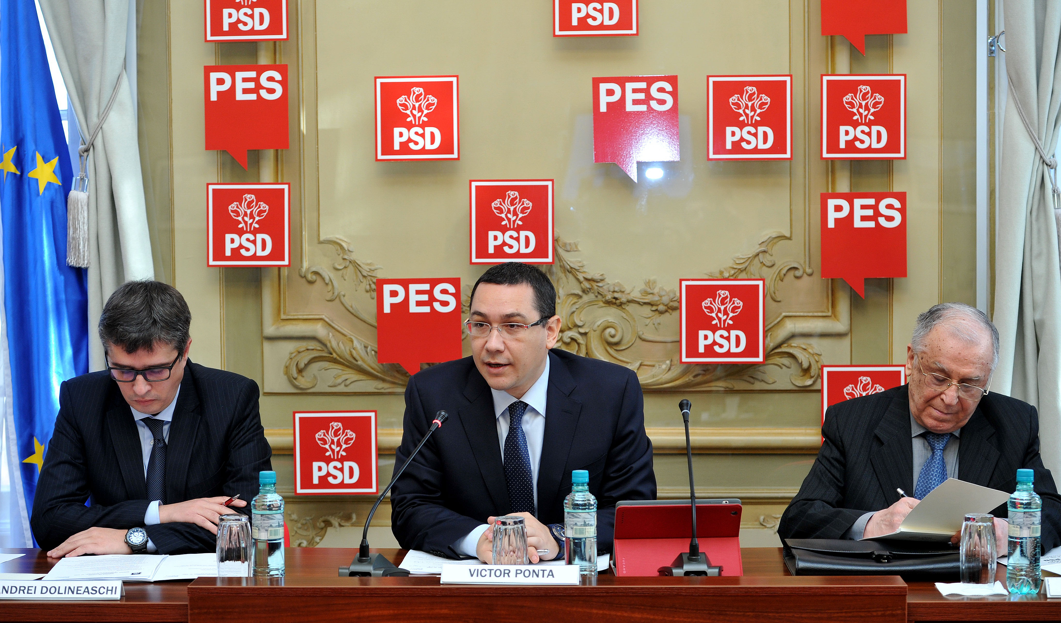 Victor Ponta, Andrei Dolineaschi si Ion Iliescu la reuniunea BPN - 16.12.2013 (4)